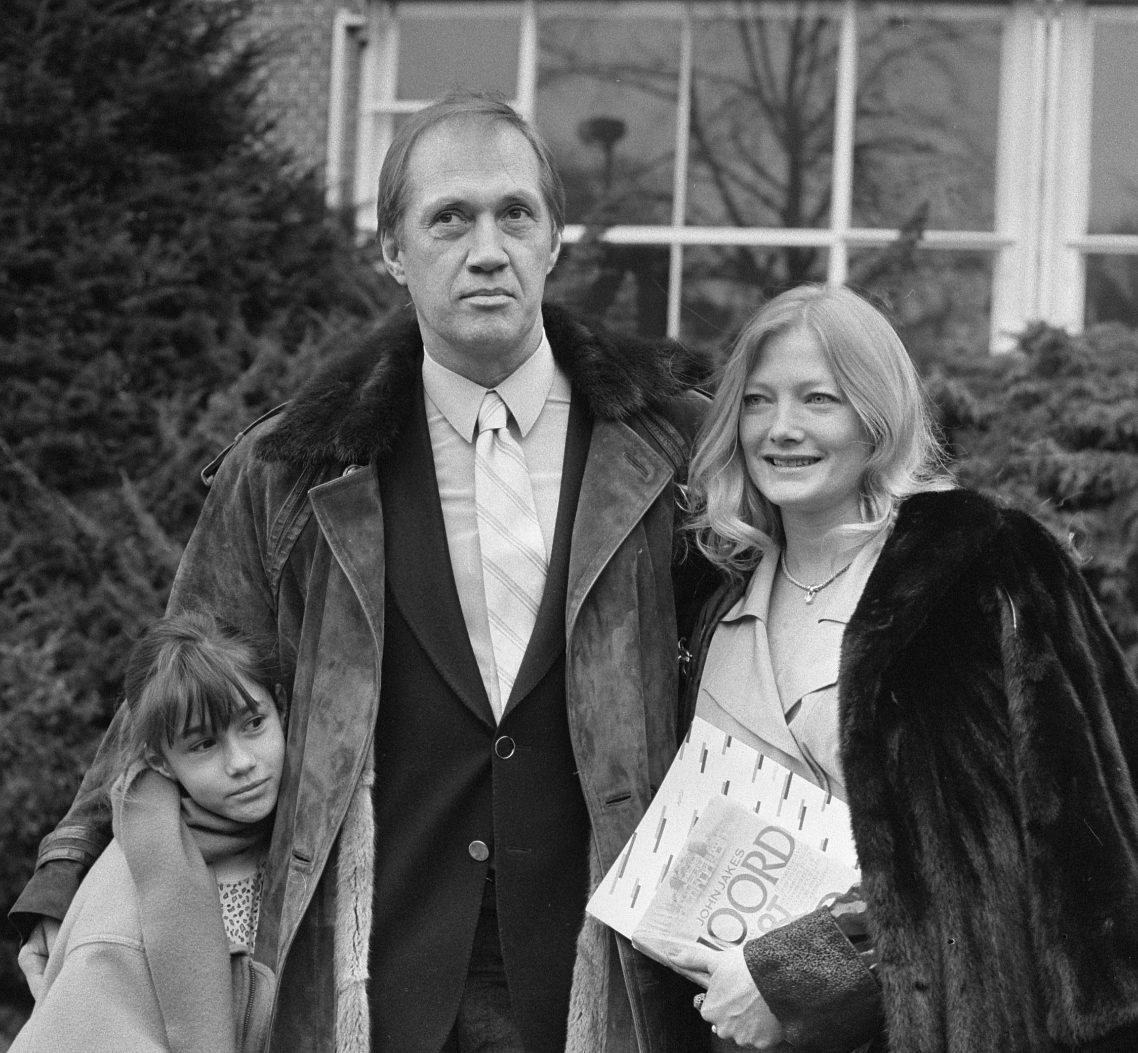 David Carradine met vrouw en kind in Hilversum voor persconferentie i.v.m. serie Noord en Zuid